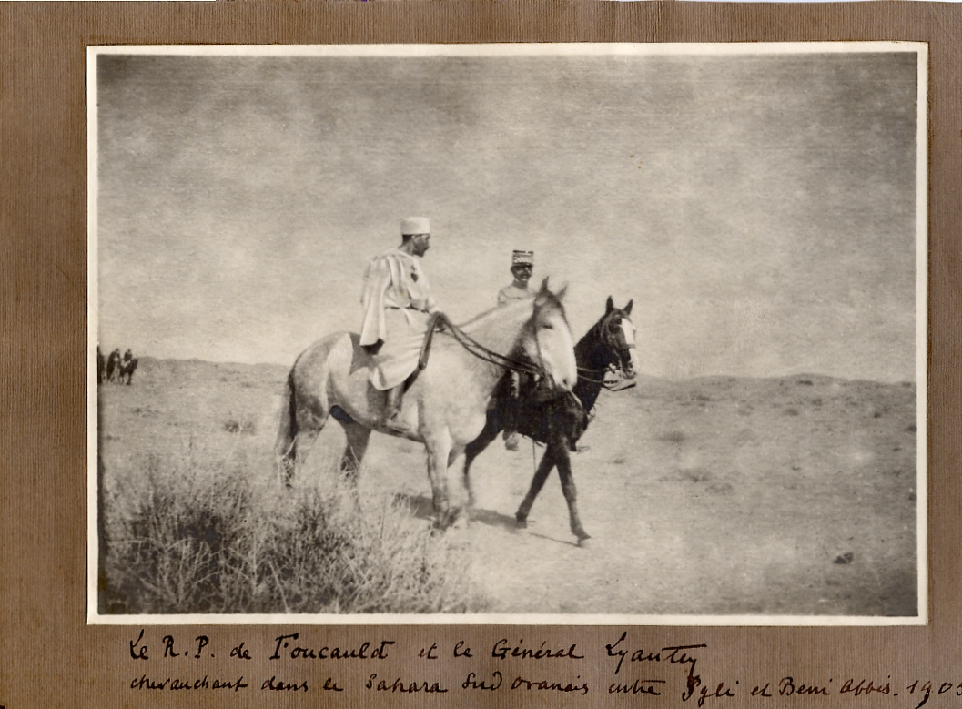 Lyautey chevauchant avec le père de Foucauld près de Beni Abbès